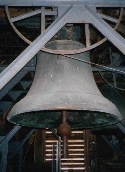 Sonntagsglocke. Größte Glocke der Alsfelder Walpurgiskirche.